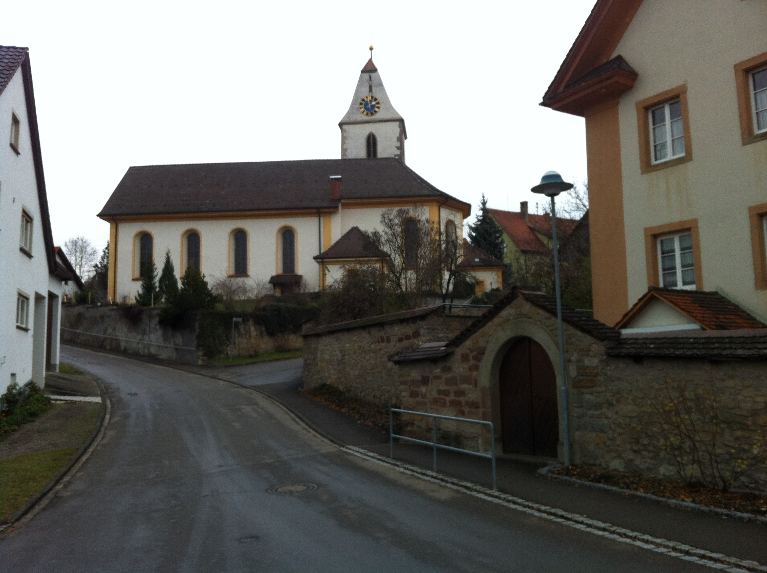 Fützen, Ortsteil der Stadt Blumberg im Landkreis Schwarzwald-Baar, Baden-Württemberg. Straßenpartie zur Kirche, rechts das Pfarrhaus